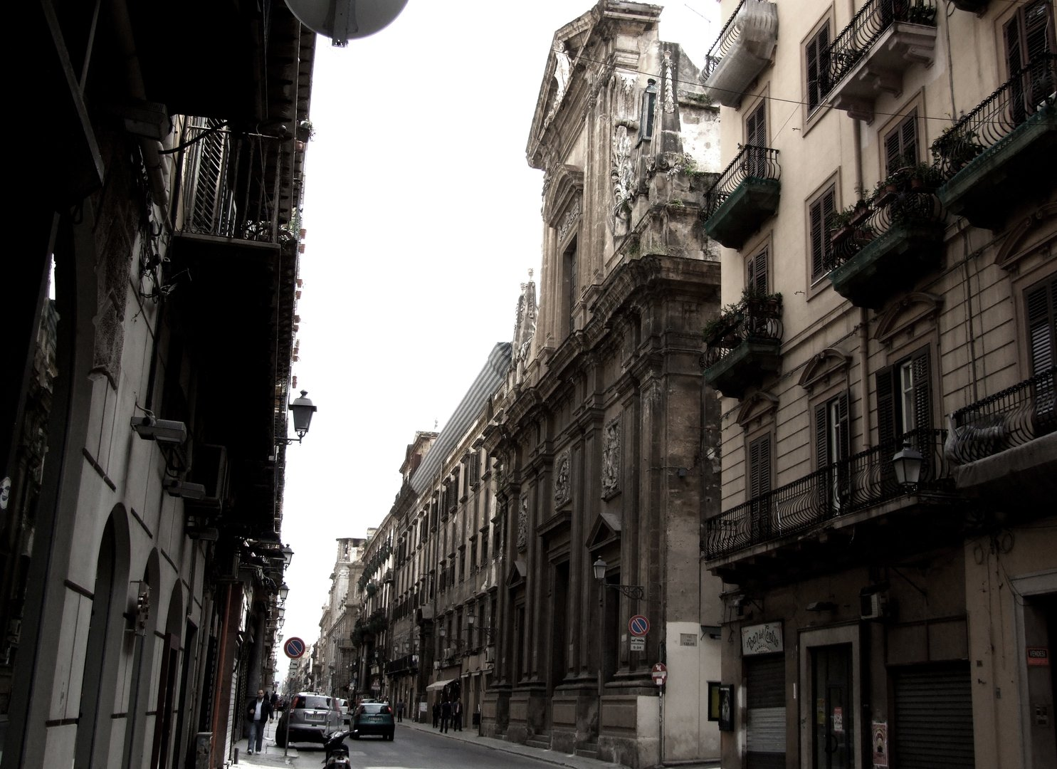 Palermo